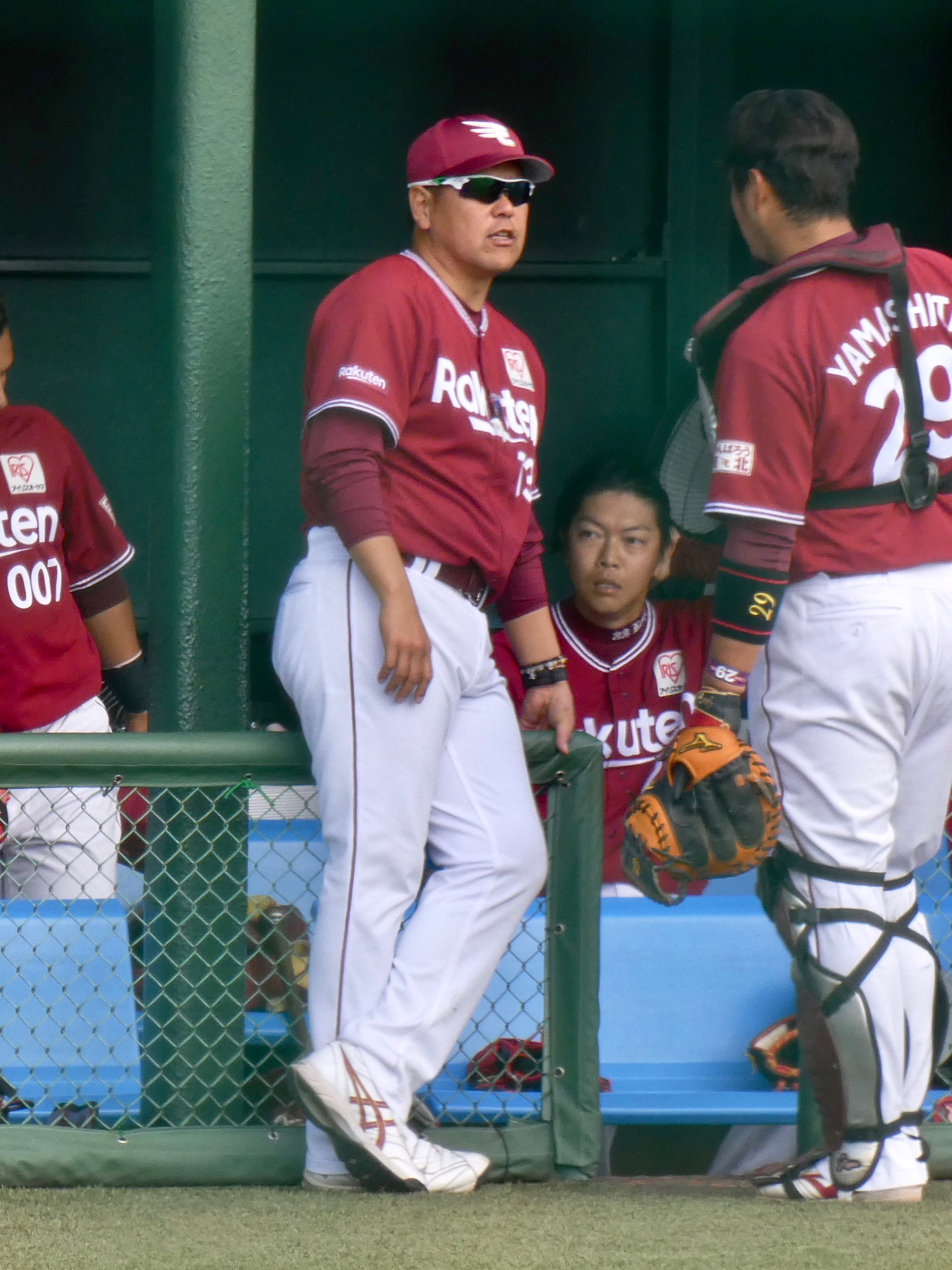 ヤクルト戸田球場にて